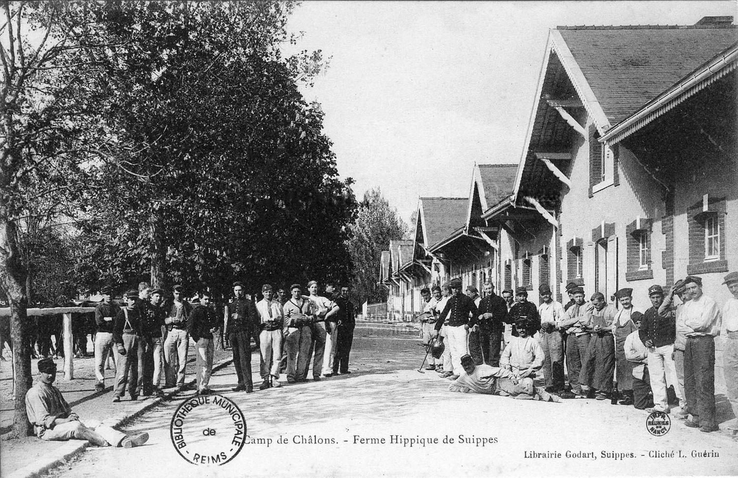 sur une carte postale ancienne.